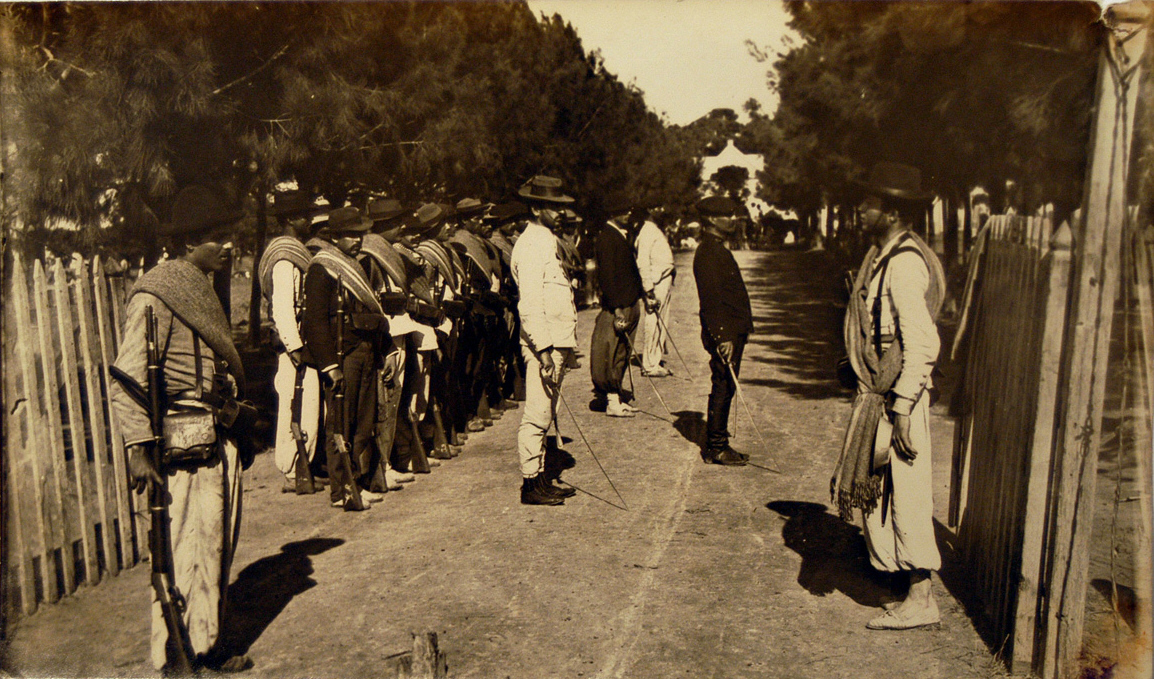 Fotografía de los Guardias Nacionales de Uruguay en el marco de la revolución de 1904.